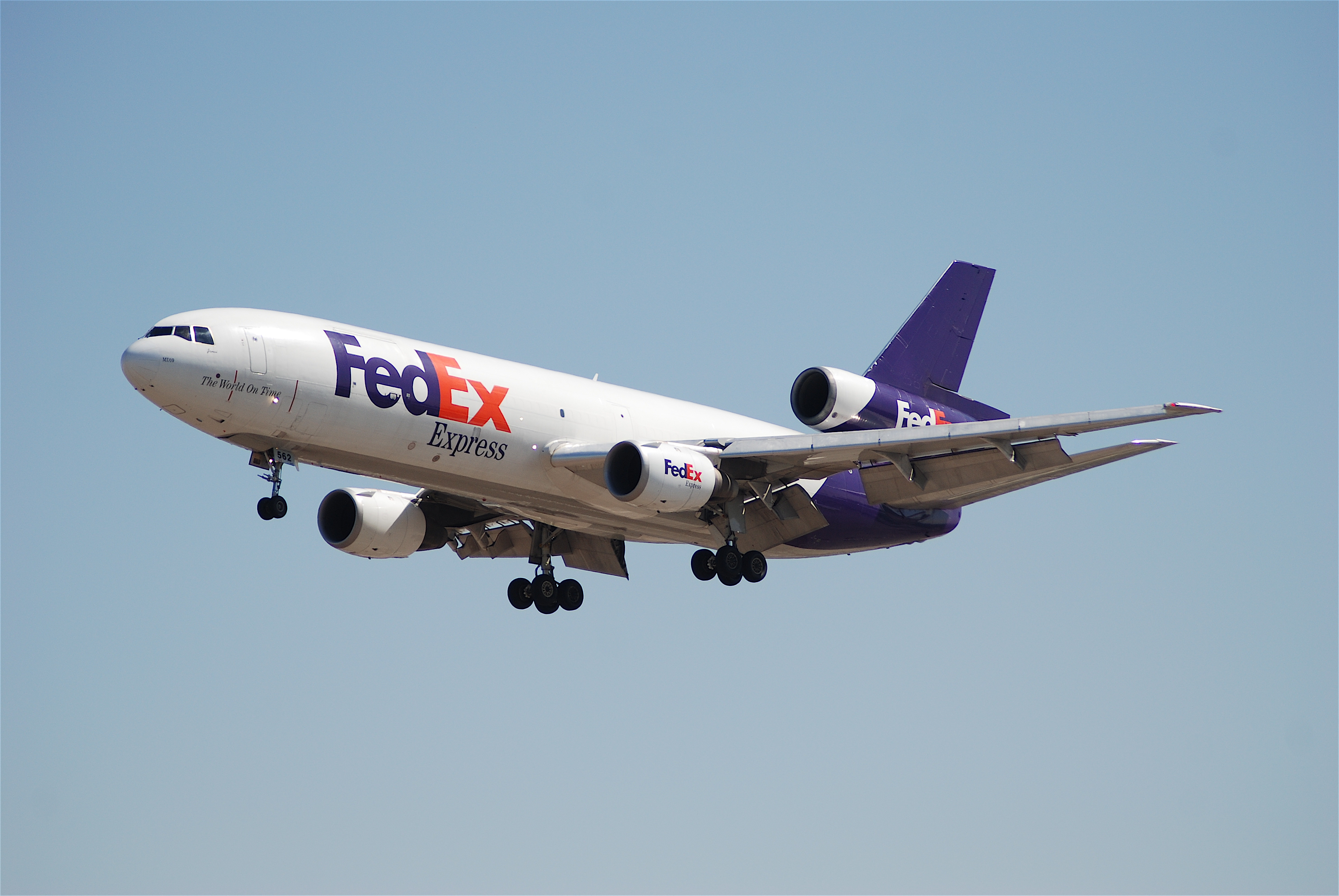 FedEx MD-10; N562FE@LAX;19.04.2007/465ku